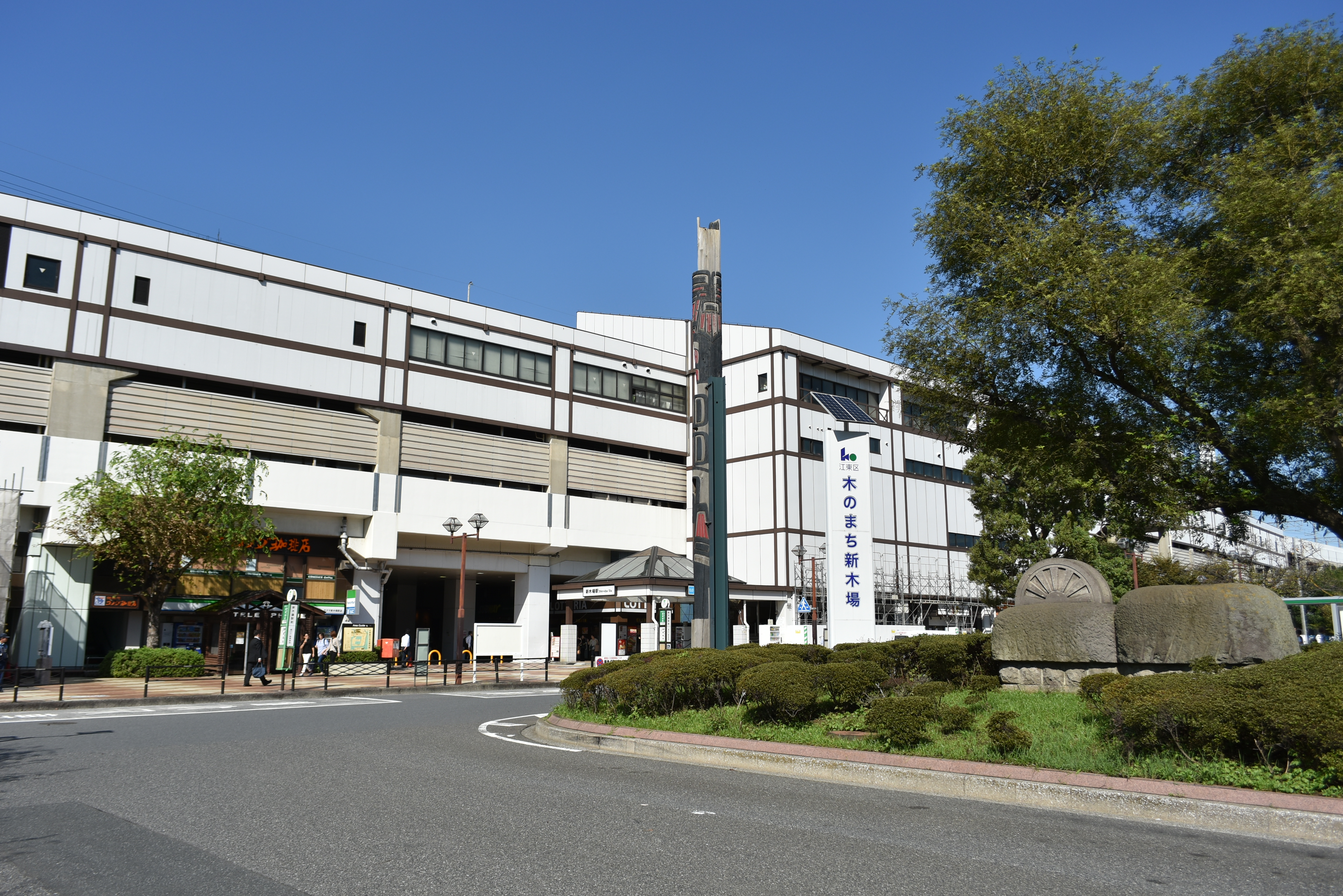 新木場駅